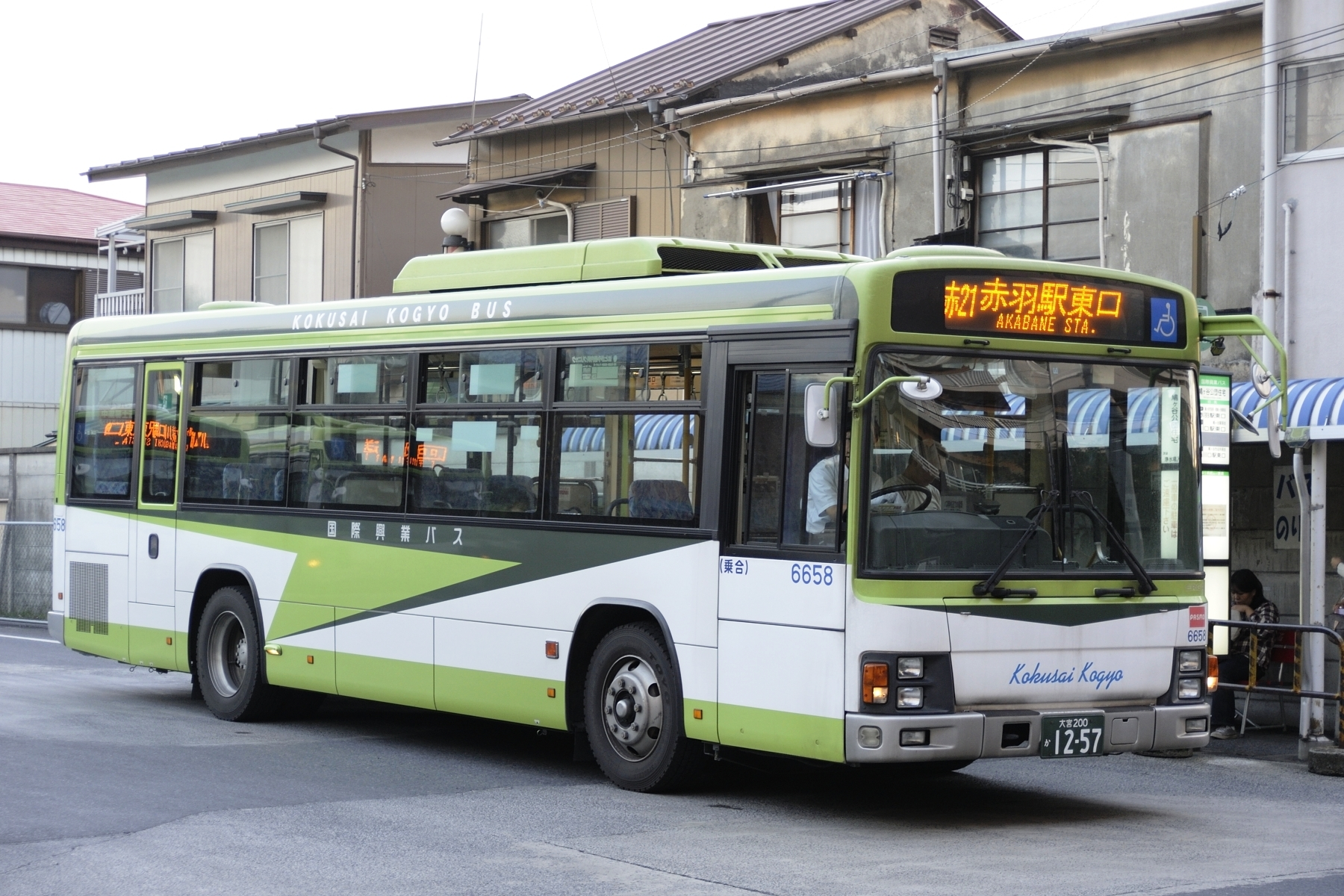 国際興業バス鳩ヶ谷営業所6658号車、赤21運用